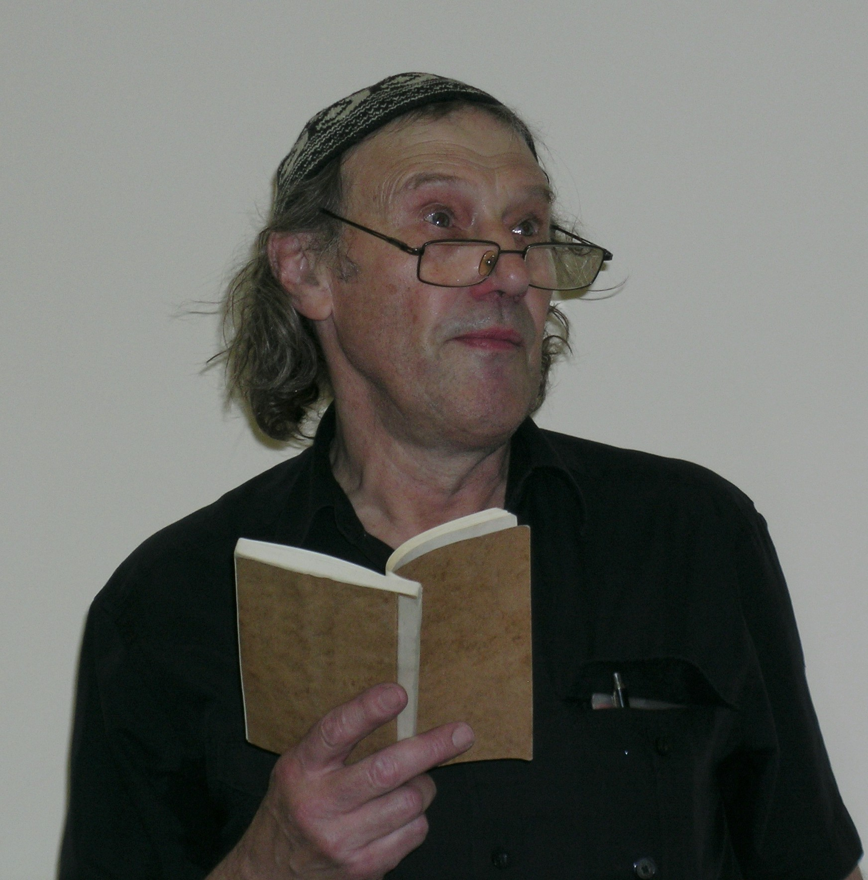 Творческая встреча. Май 2011.